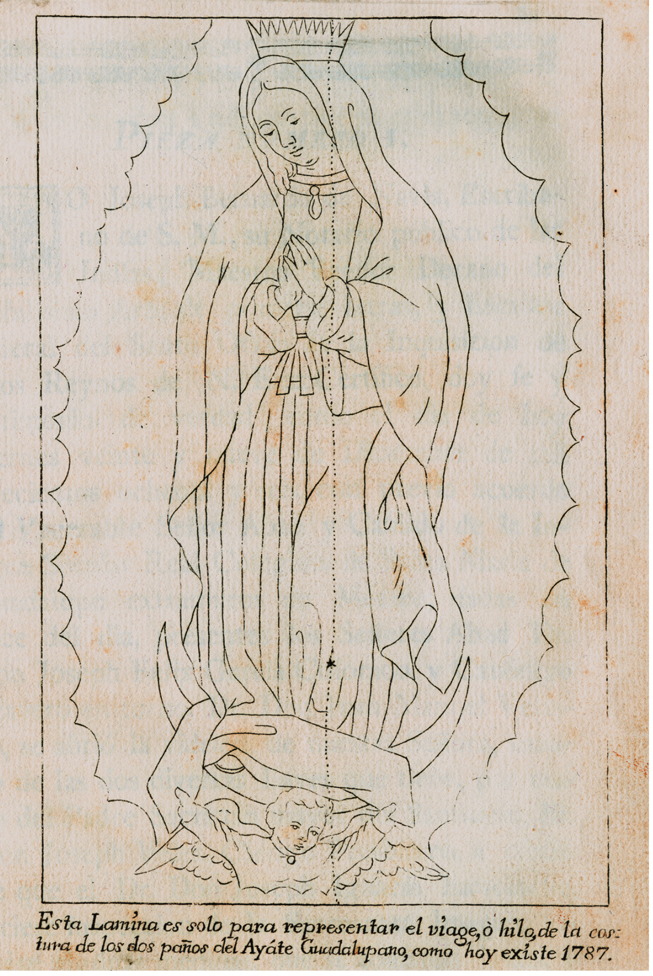 Una de las primeras imagenes de los análisis hacia la Virgen de Guadalupe